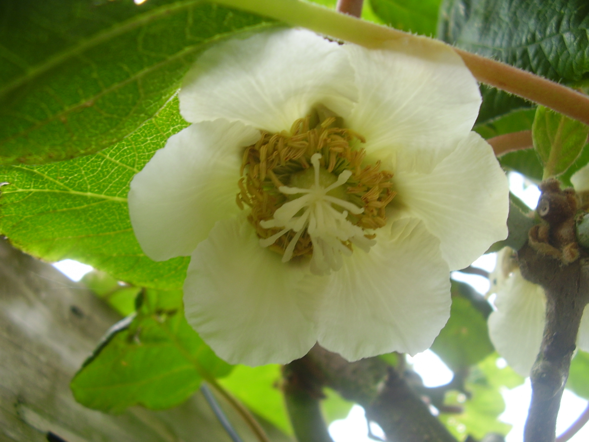 actinidia deliciosa kiwi